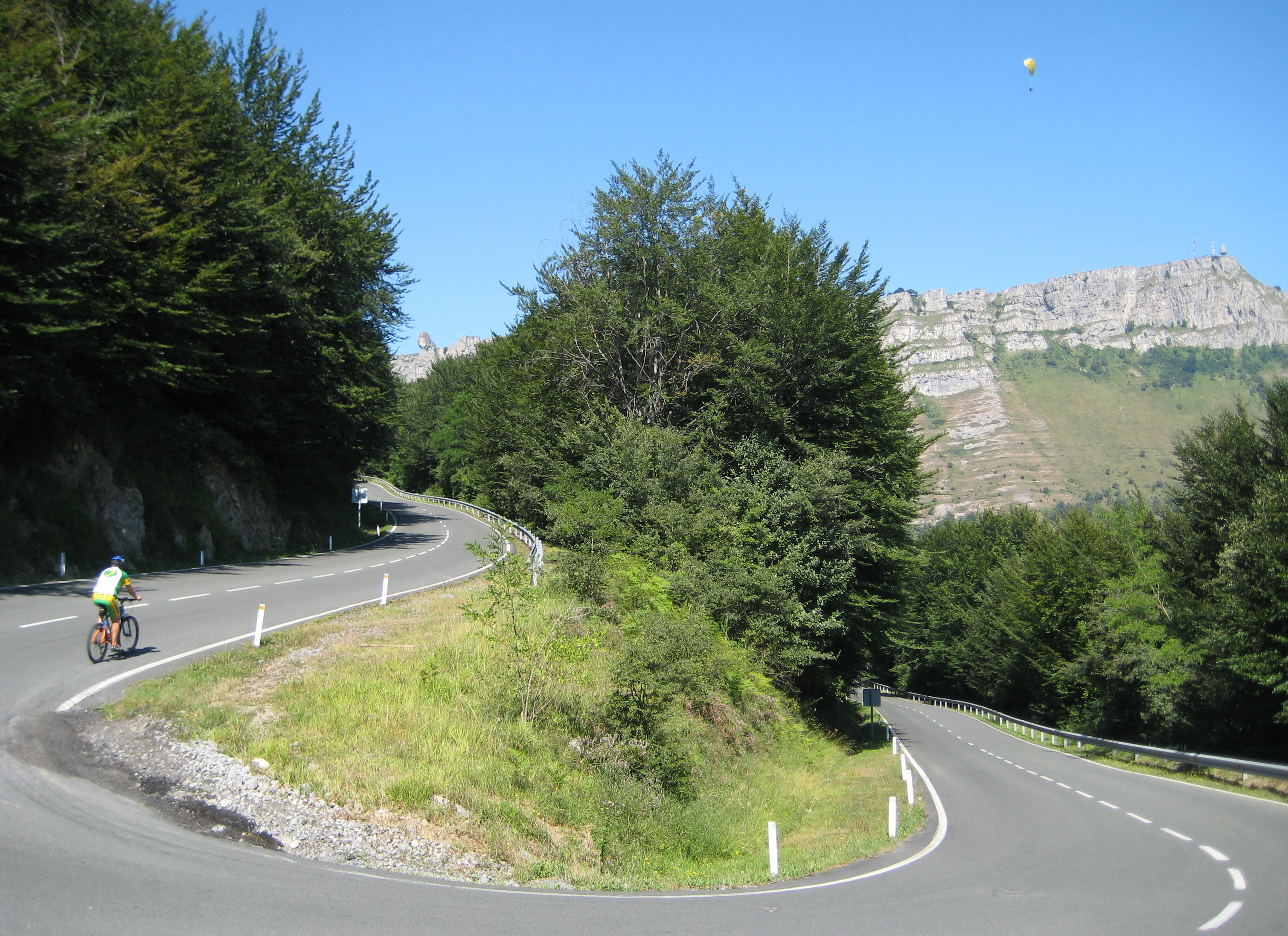 Carretera BI-2625 / A-2625 en el Puerto de Orduña, entre Orduña y Berberana.